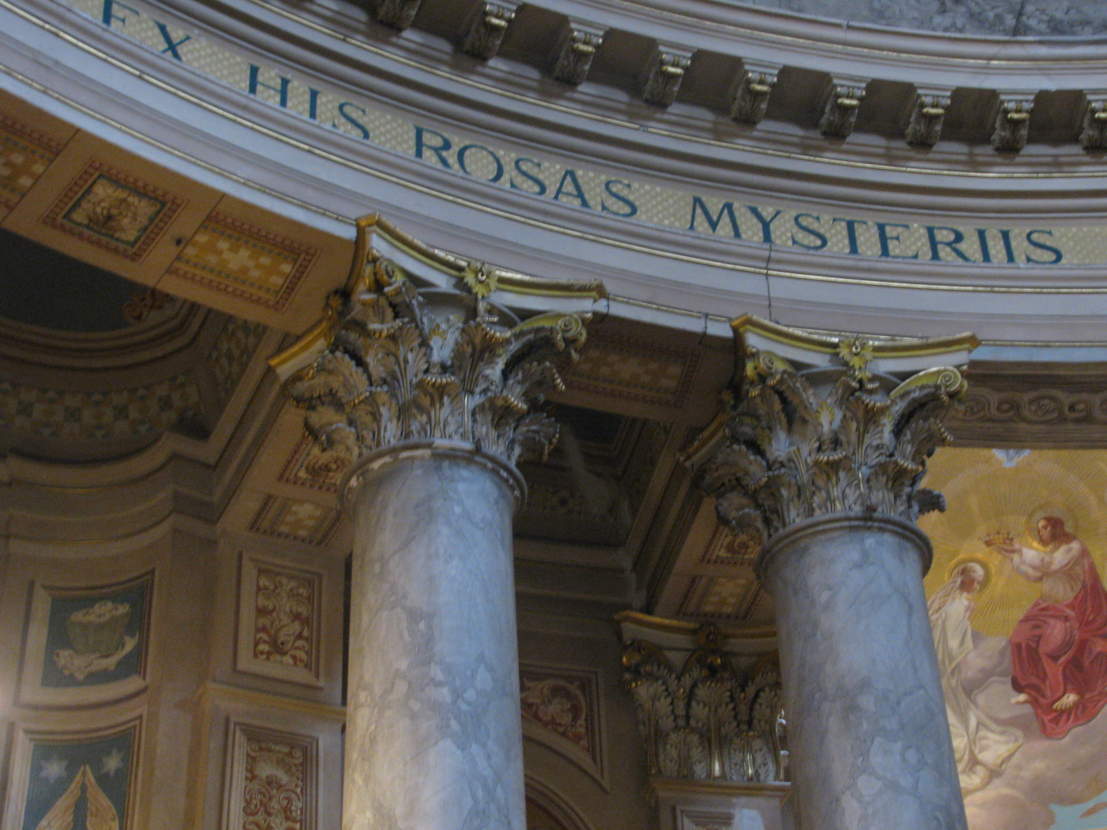 Capiteles Corintios